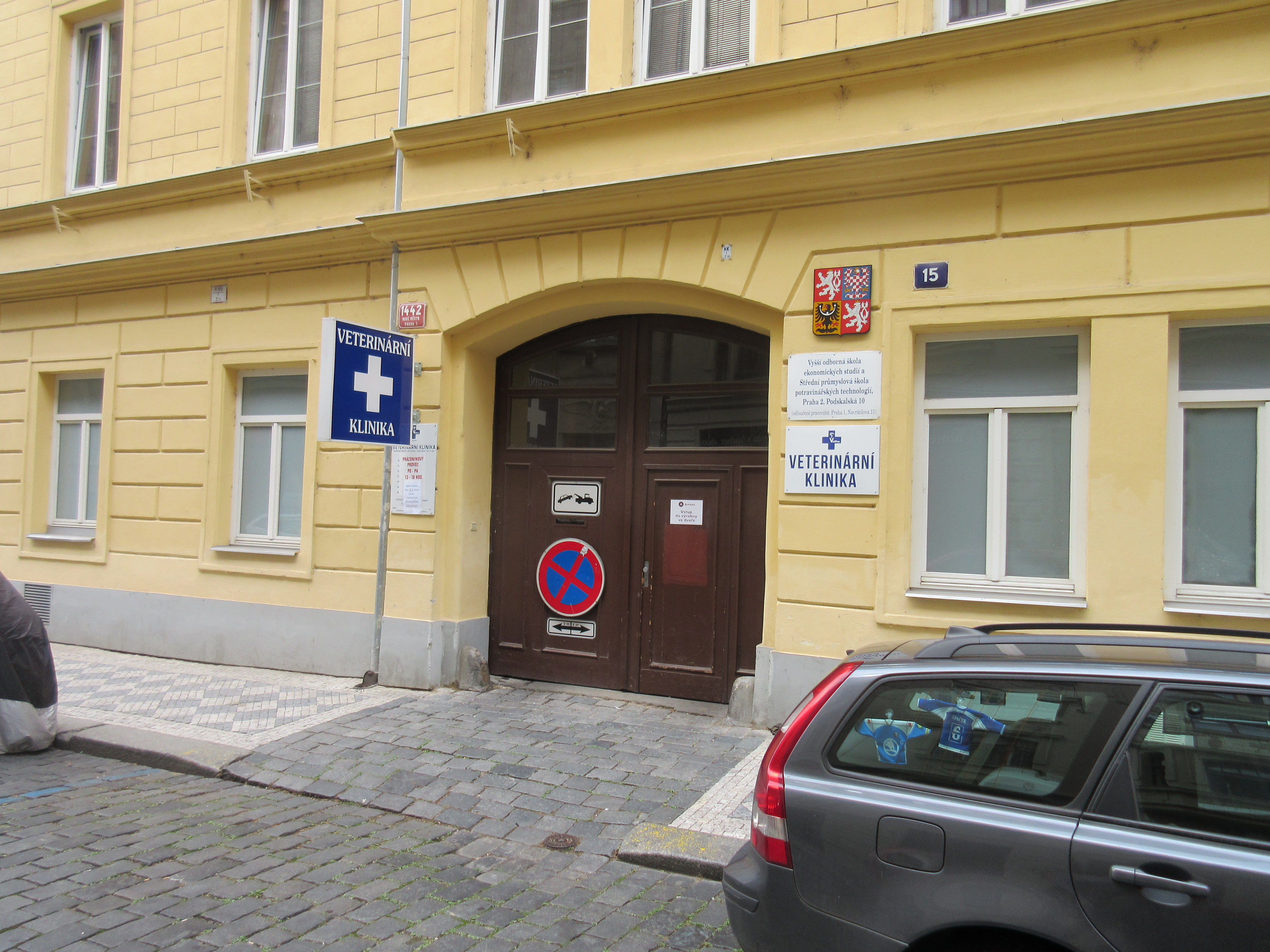 Veterinární klinika a pobočka školy Navrátilova 1442/15 v Praze 1